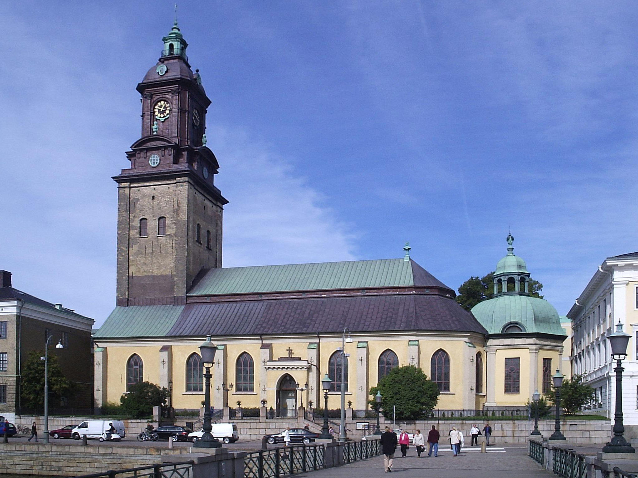 Tyska kyrkan i Göteborg, den 12 september 2005. Fotograferad av Harri Blomberg. Modification by Tobias Bär, June 2008.